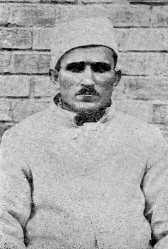 Srpskohrvatski / српскохрватски: Ivan Milutinović kao politički zatvorenik za vreme Kraljevine Jugoslavije.